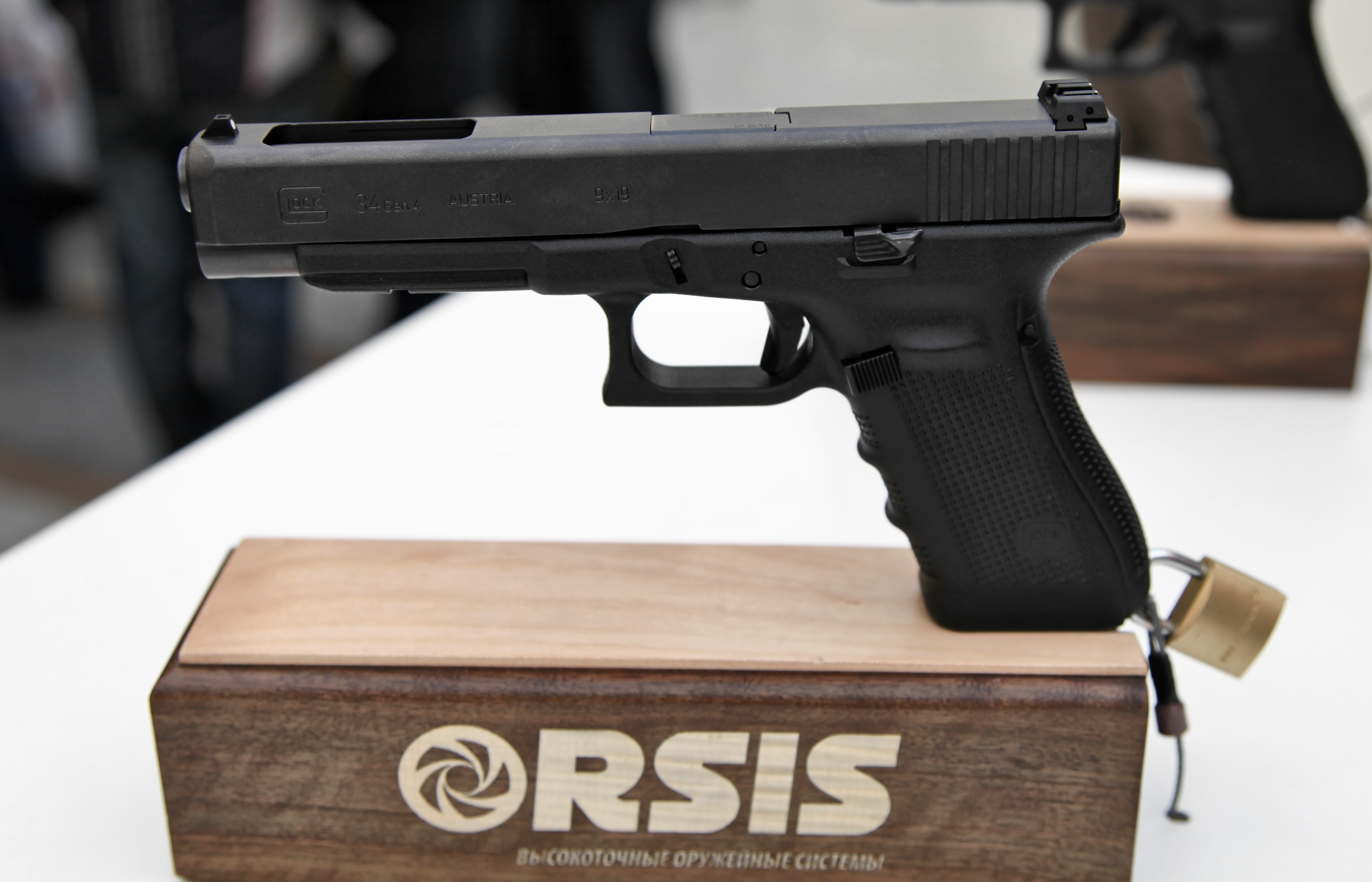 9x19 Glock 34